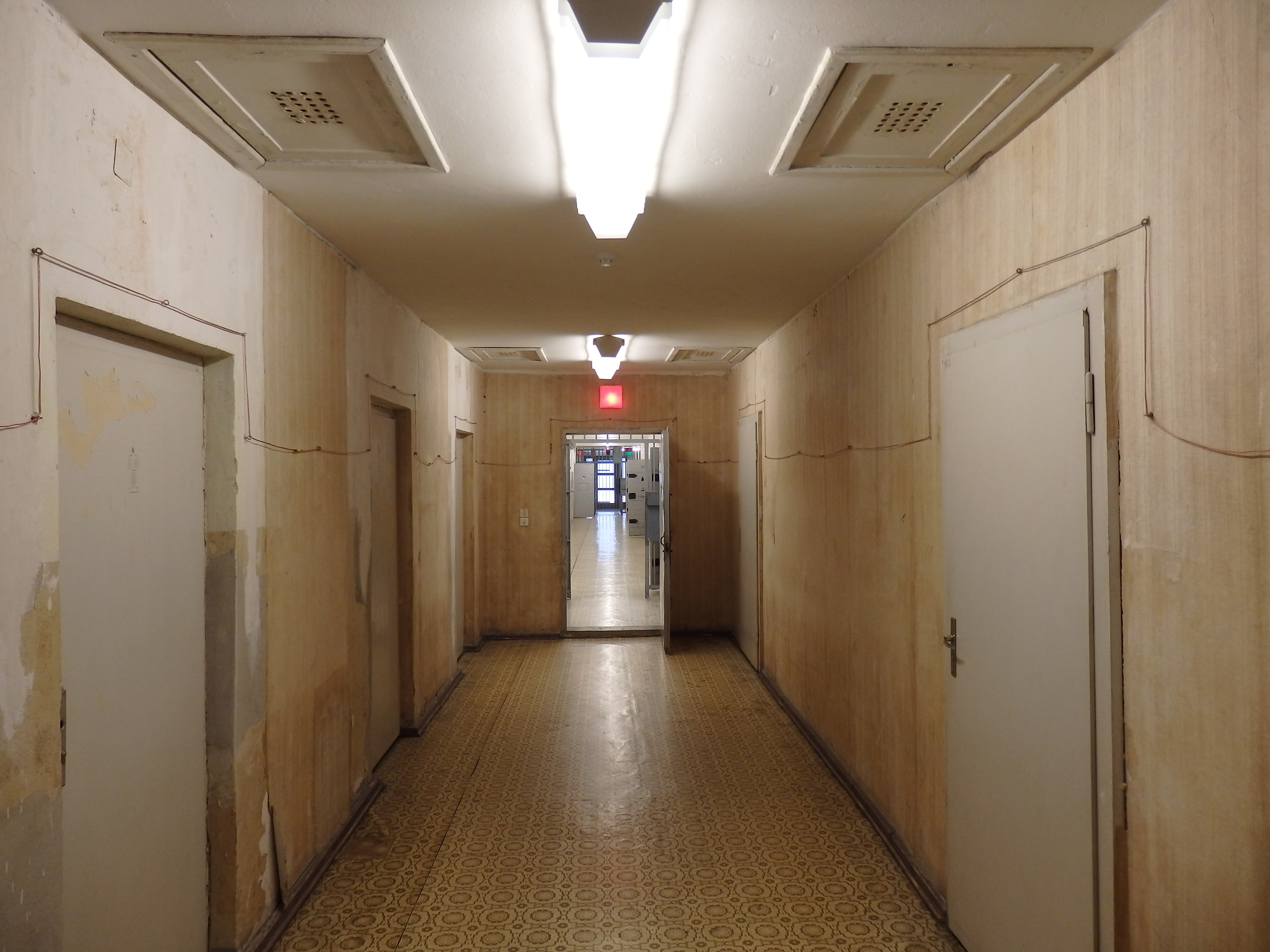 Flur mit über Putz gelegten Leitungen und leicht trennbaren Kontakten zur Alarmierung